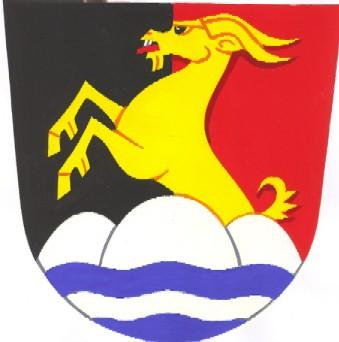 znak obce Prostřední Bečva